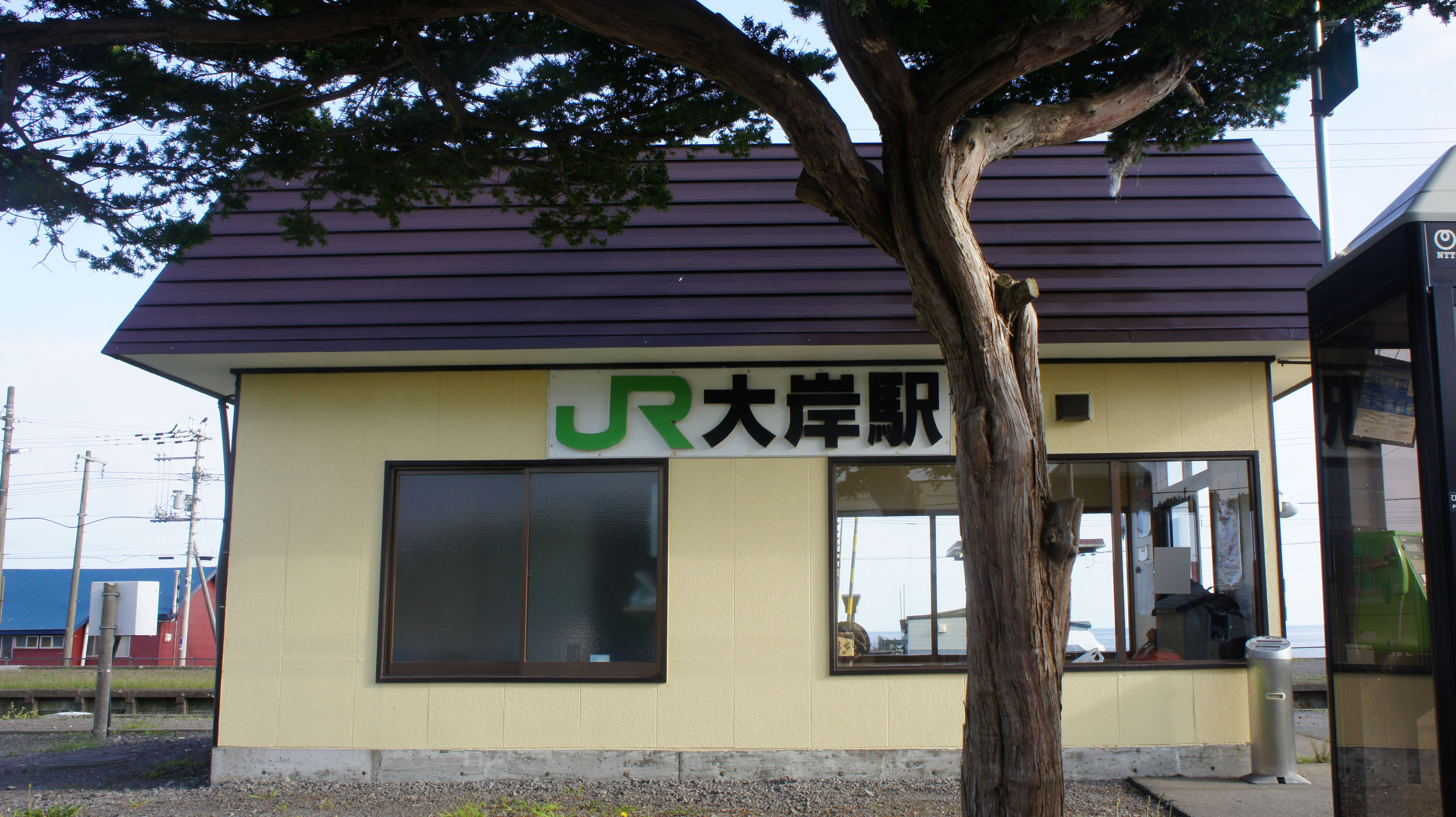 JR室蘭本線・大岸駅の駅舎